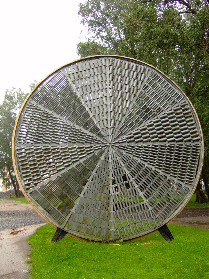 Skulptur von Antoni Starczewski (1924 - 2000) vor der „Galerie EL“ in Elbląg - Durchmesser: 6m